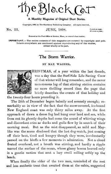 Black Cat magazine